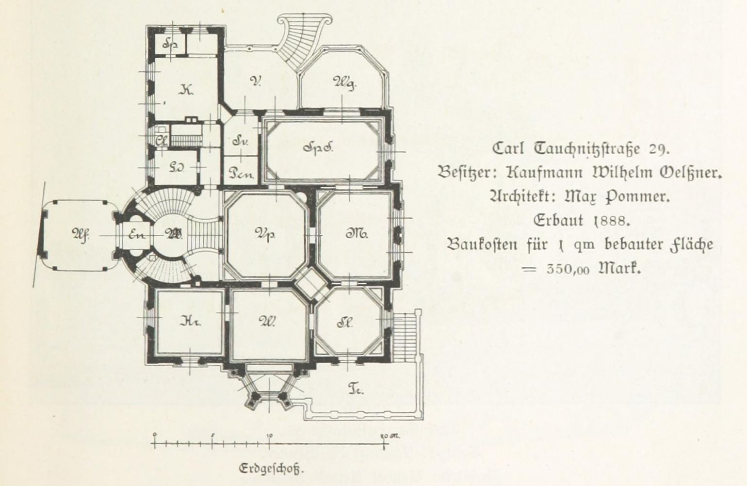 Villa des Leipziger Großkaufmanns Wilhelm Oelßner im Villenviertel Karl-Tauchnitz-Straße. Alte Hausnummer 29, nach neuer Zählung 13. Erbaut 1888 nach Plänen von Max Pommer Grundriss